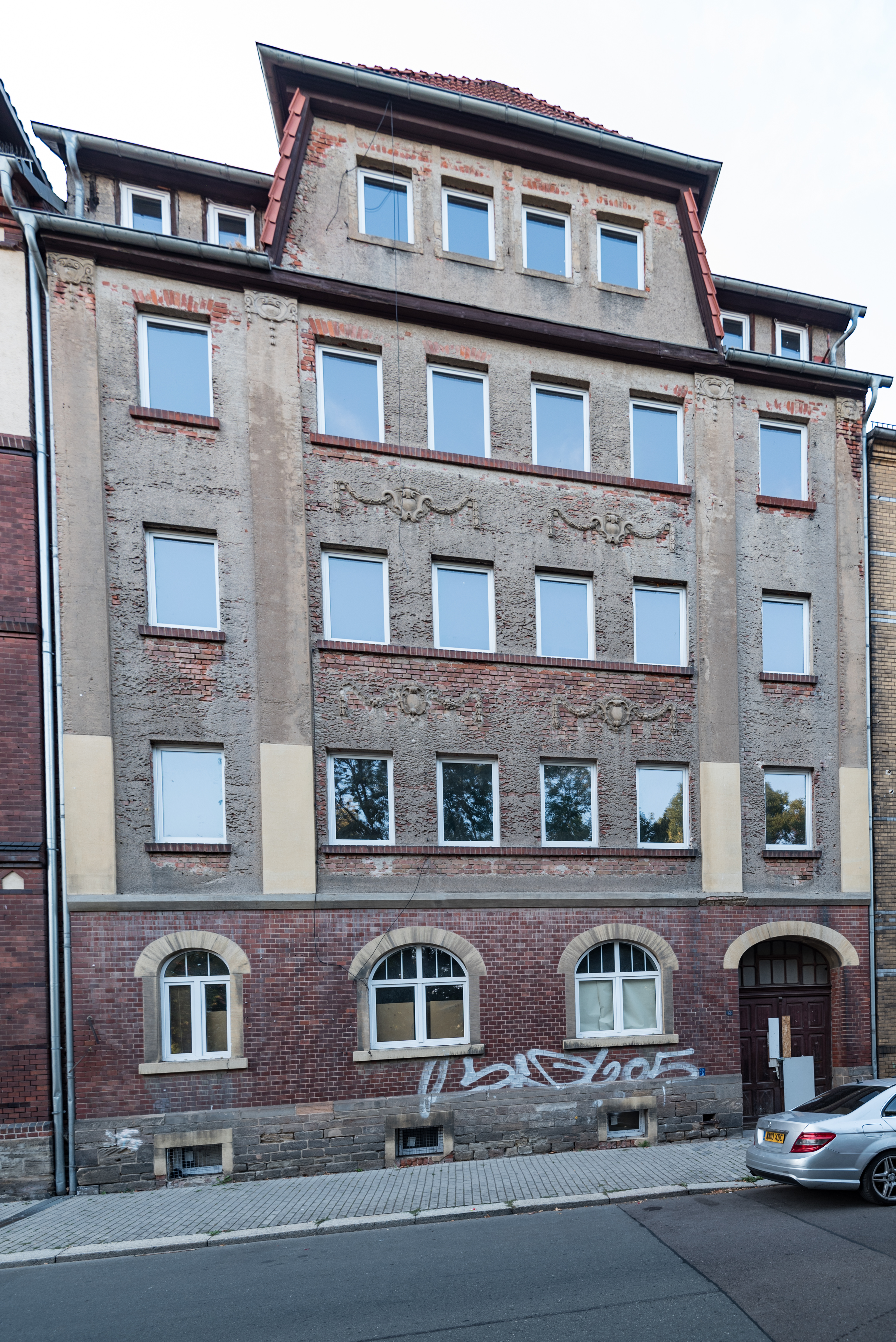 Weißenfels, Große Deichstraße 13